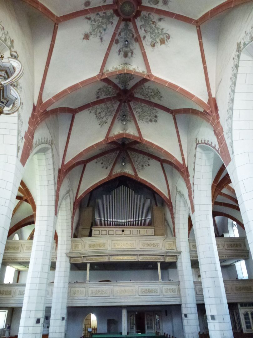 Deckenkonstruktion der Stadtkirche St. Laurentius (Pegau)